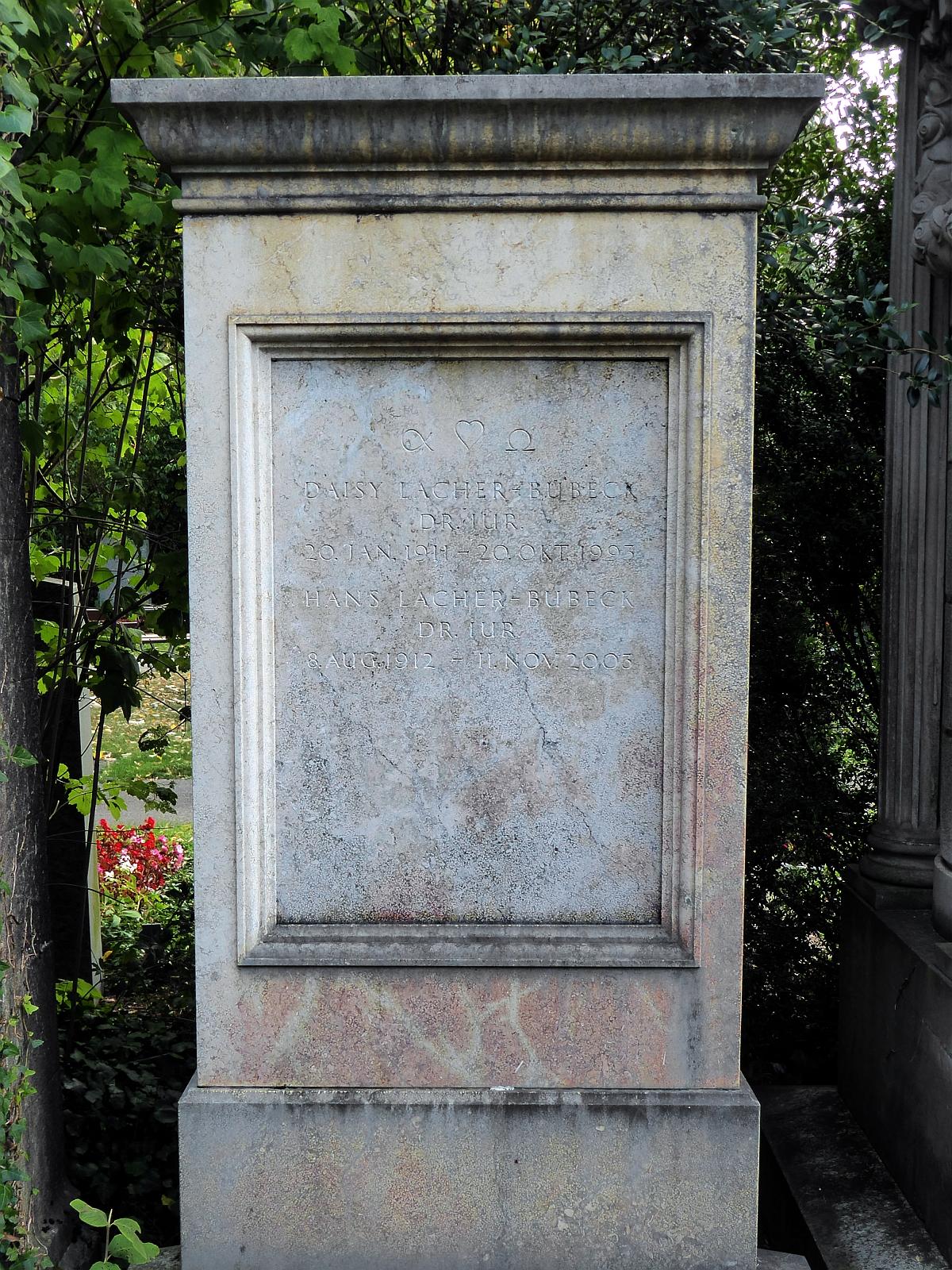 Hans Lacher-Bubeck (1912–2003) Jurist, Diplomat, Grab auf dem Friedhof Wolfgottesacker, Basel